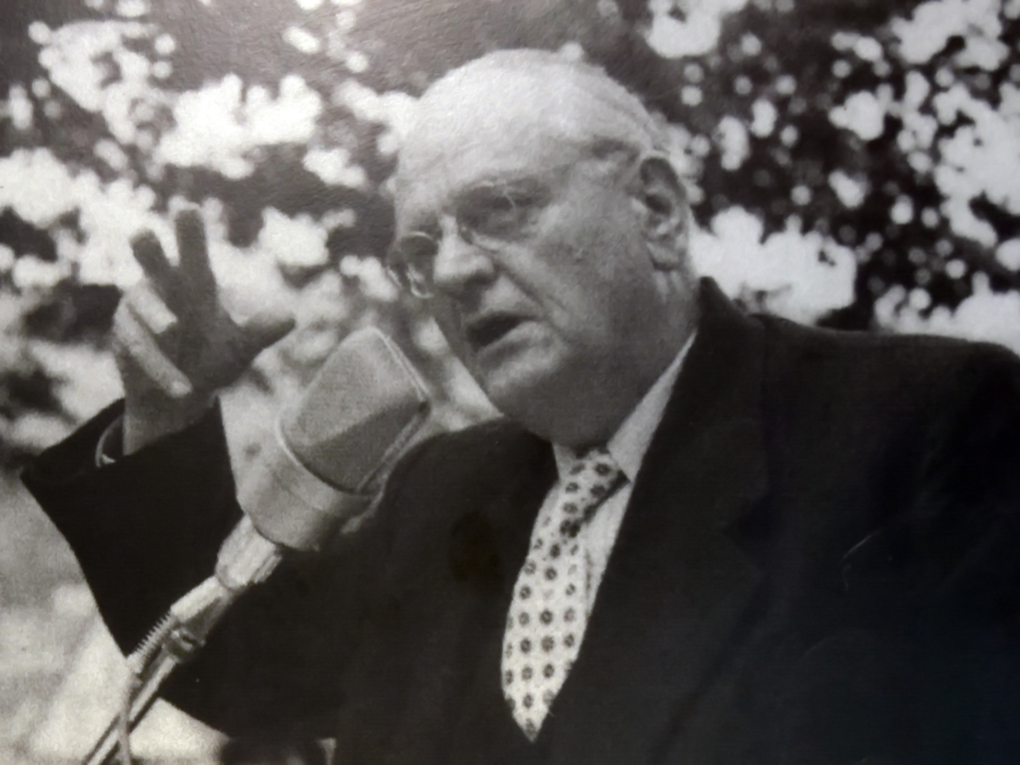 Gottlieb Duttweiler, Park im Grüene in Rüschlikon (Switzerland)